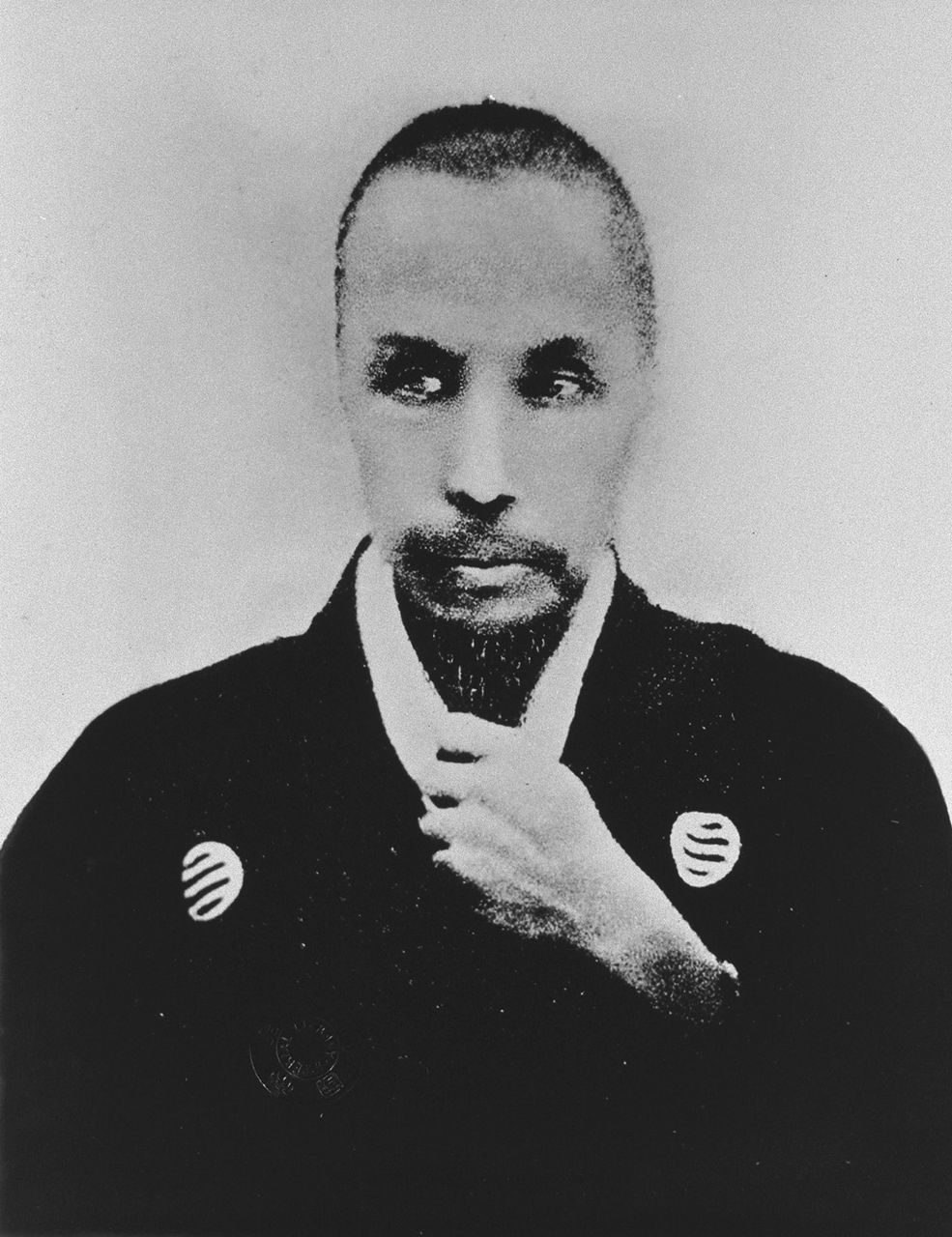 Portrait of Sakuma Shozan (佐久間象山, 1811 – 1864)